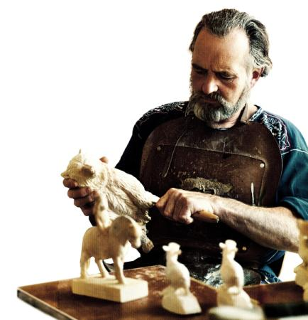 Treskjæreren Henning Engelsen